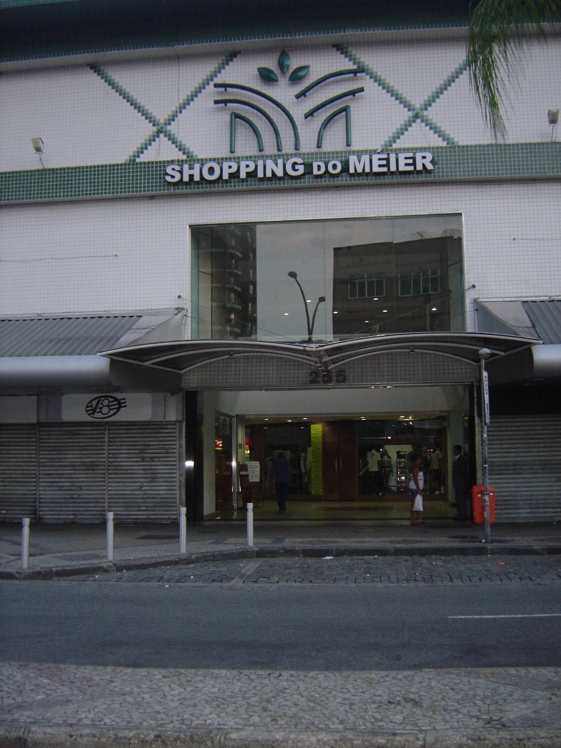 Entrada principal do Shopping do Méier, Rio de Janeiro, Brasil.